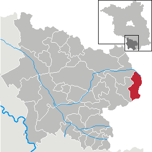 Sallgast in Brandenburg (Country) - District Elbe-Elster